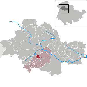 Heroldishausen in Thuringia - Unstrut-Hainich-Kreis